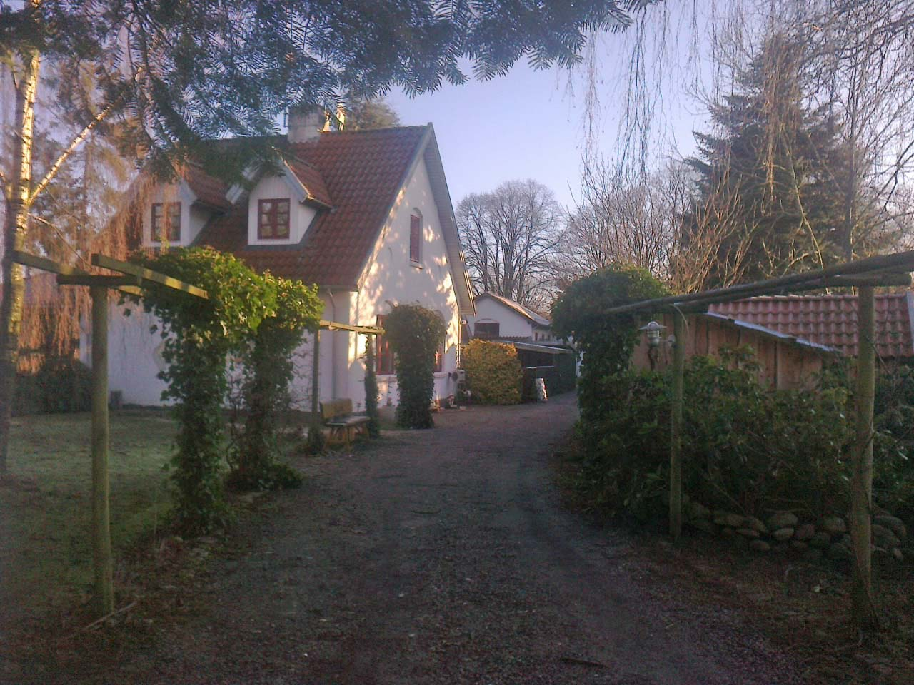 Tovstrup Station